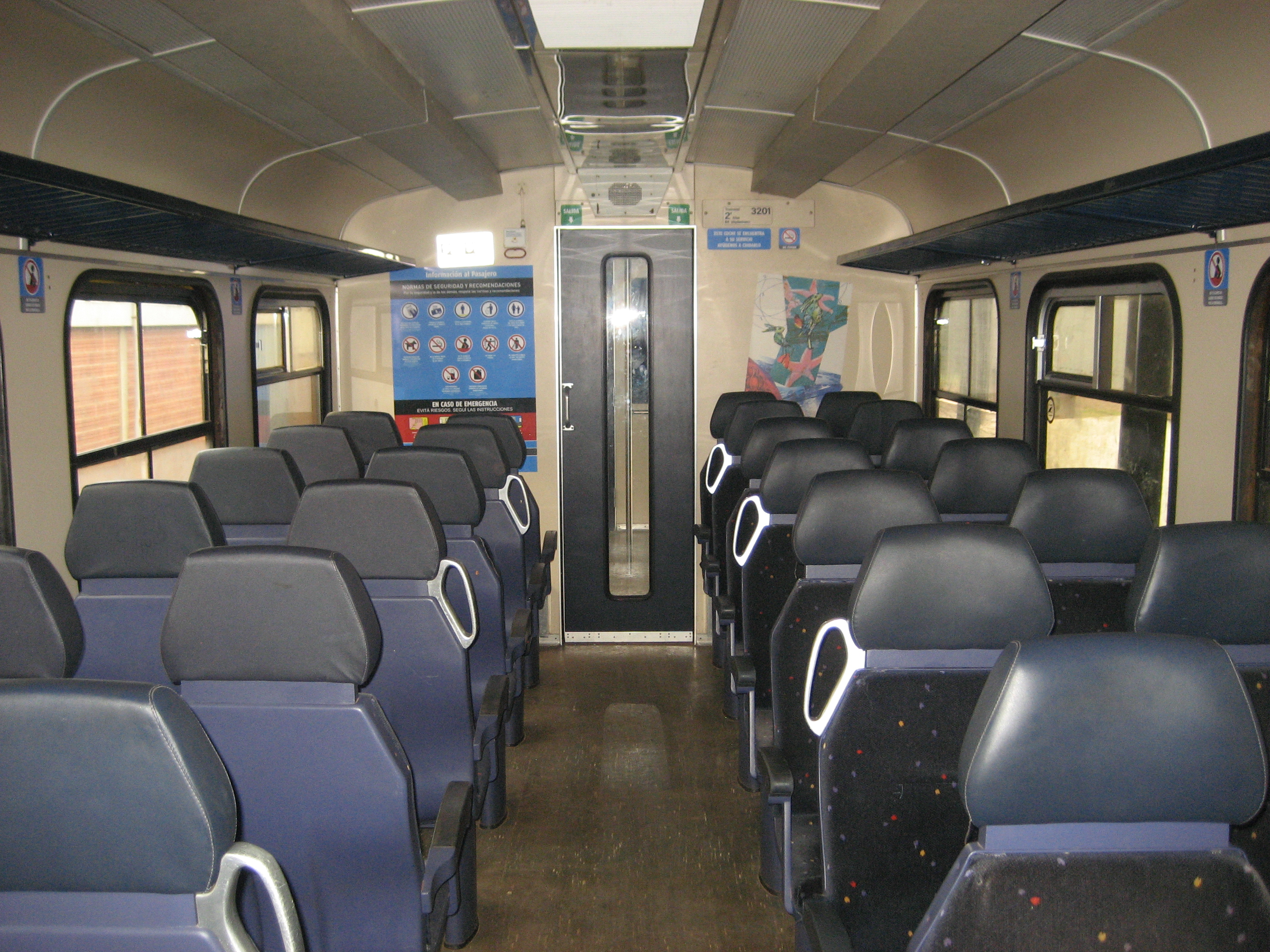 Interior del coche que presta el servicio internacional Posadas - Encarnación, de origen holandés